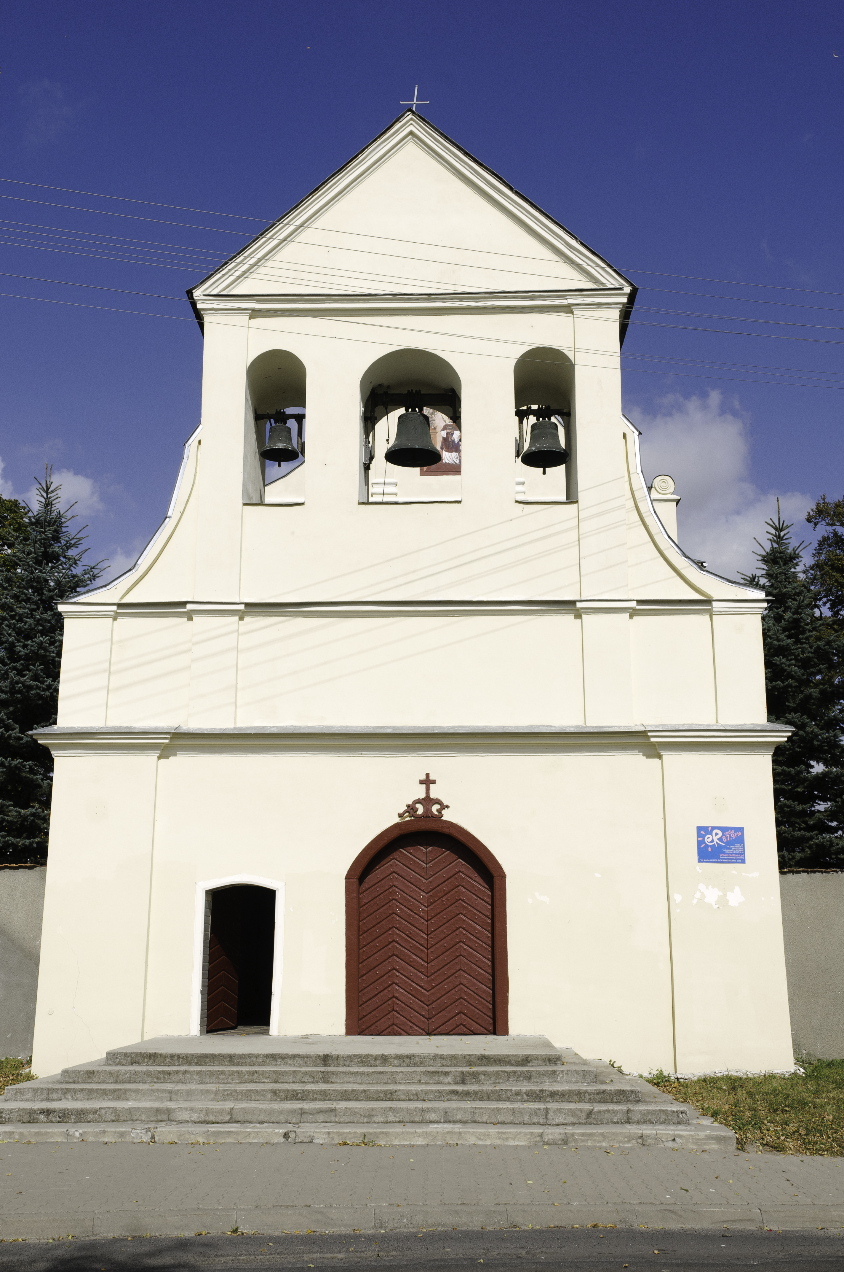 Żółkiewka - dzwonnica-brama w zespole kościoła parafialnego V-Oa/7/42/59.